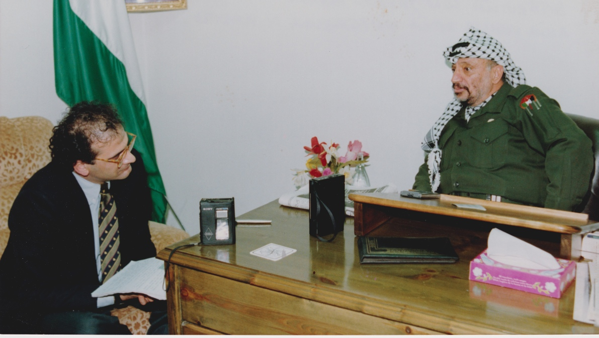 Fabio Scuto nel 1990 durante un'intervista con Yasser Arafat